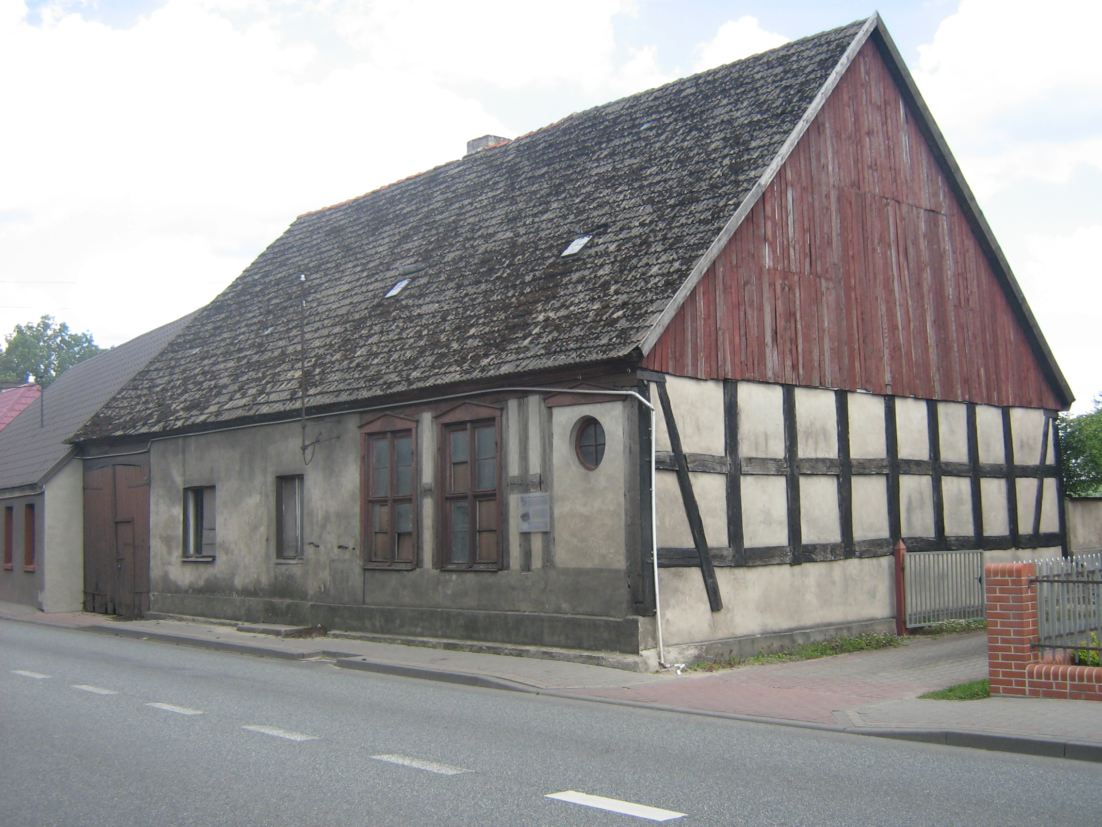 Zabytkowy dom w Mirosławcu